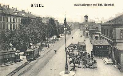 首座于1862年5月1日开放的巴塞尔巴登车站